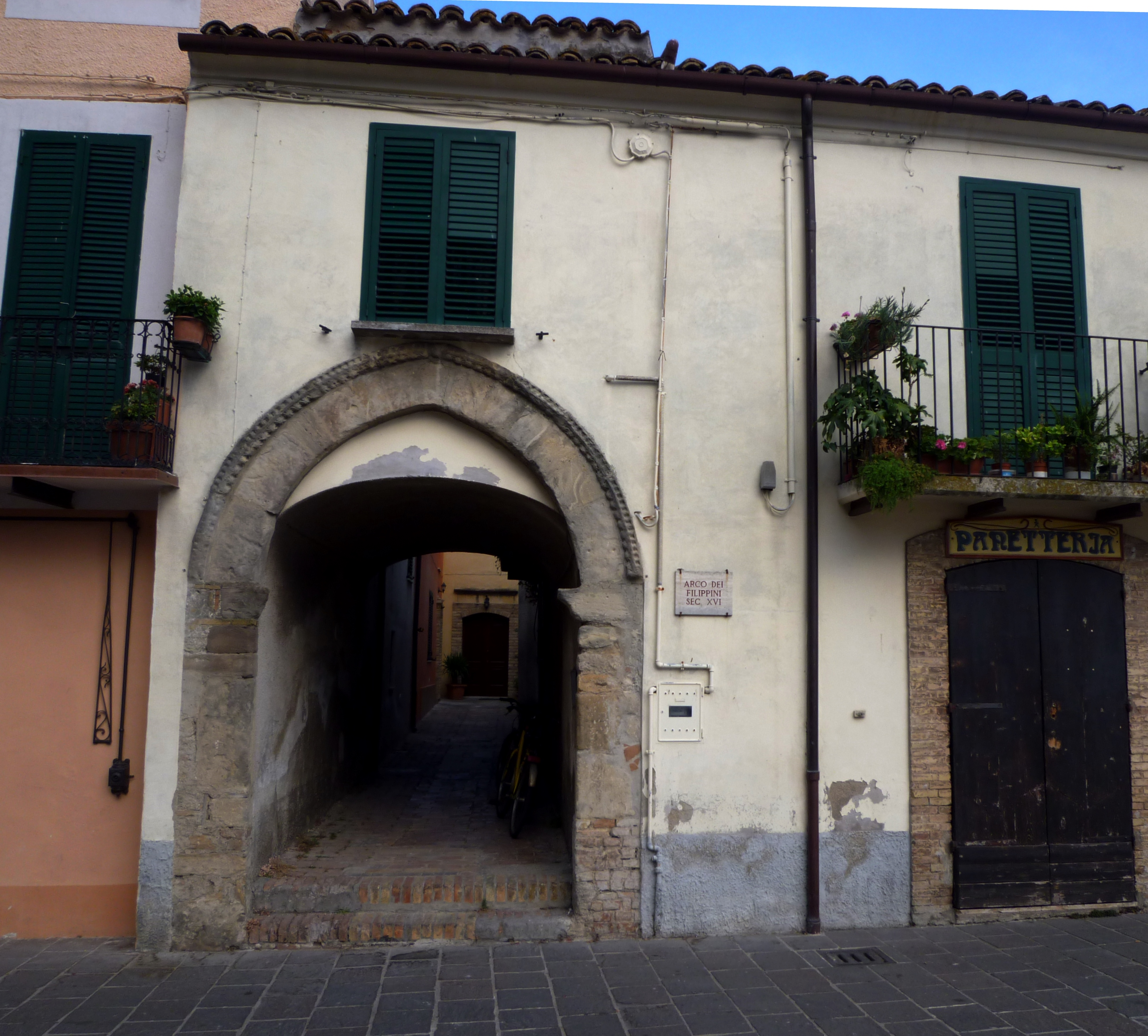 Arco dei Filippini (XVI sec.), Rocca San Giovanni, Chieti.